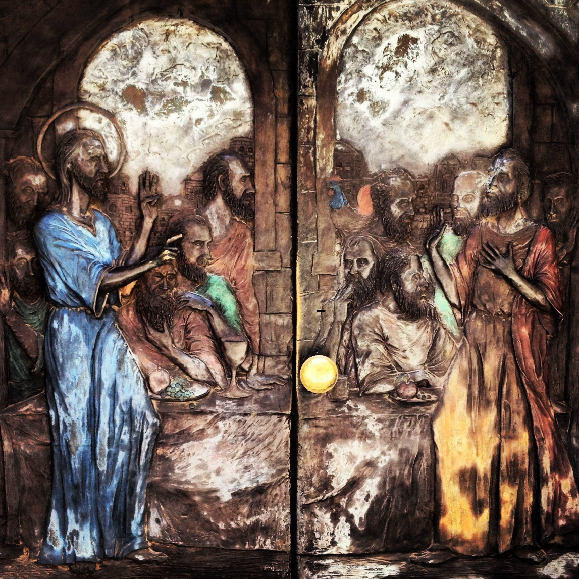 כנסיית פטרוס אין גליקנטו היא כנסייה ומנזר מודרניים בהר ציון השייכים למסדר האסומפסיוניסטים הקתולי. המבנה ביזנטי ובנוי כצלב קצר-זרועות. לכנסייה כיפה ובראשה שבשבת בדמות תרנגול. ליד הכנסייה מוצג דגם של ירושלים בתקופה הביזנטית.